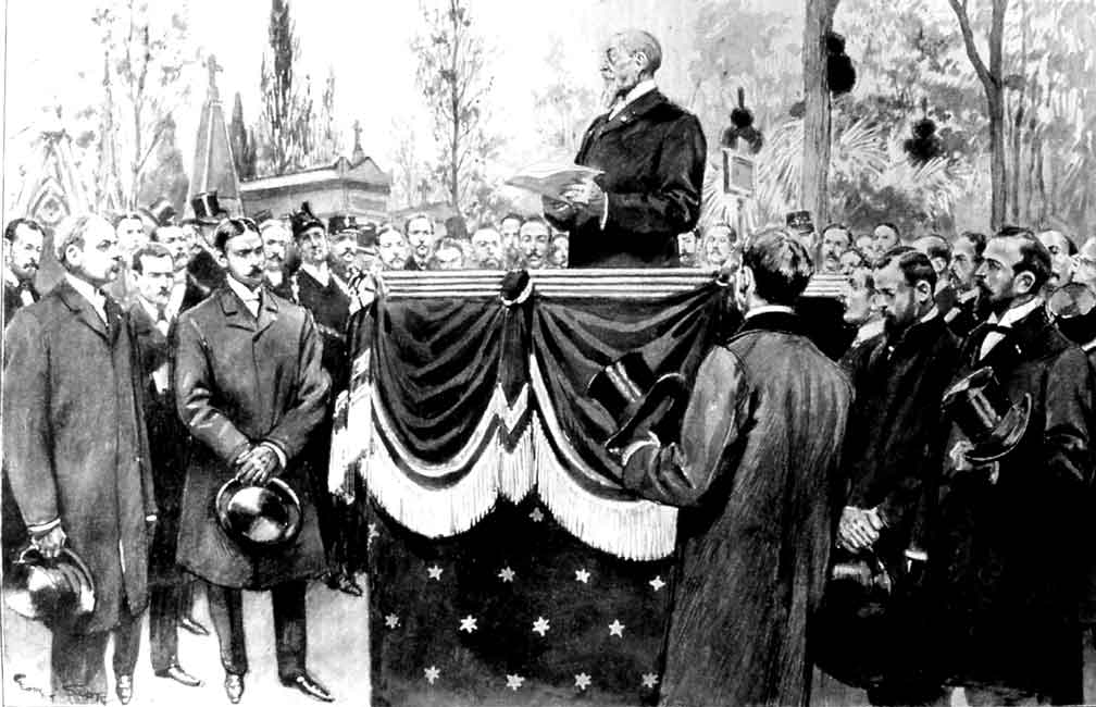 Anatole France aux obsèques d'Emile Zola - Affaire Dreyfus